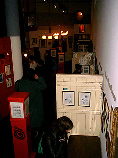 exposition L'Association, Angoulème 2000